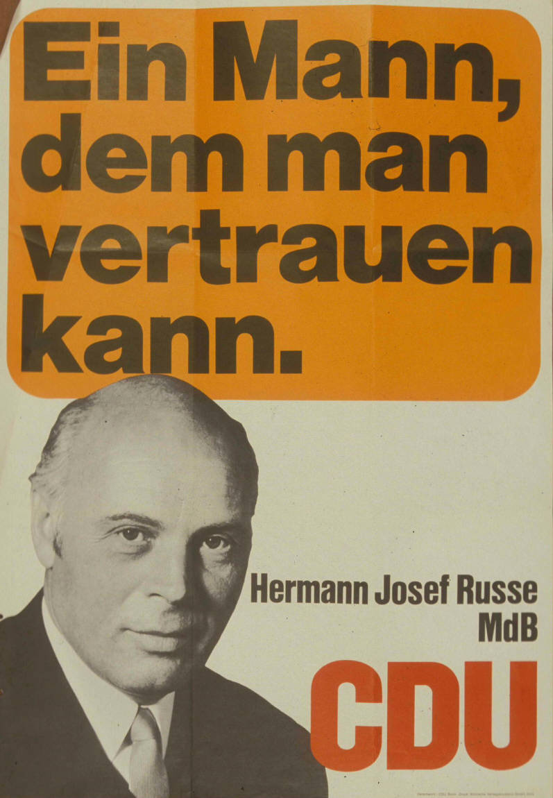 Ein Mann, dem man vertrauen kann. Hermann Josef Russe MdB CDU Abbildung: Porträtfoto Plakatart: Kandidaten-/Personenplakat mit Porträt Auftraggeber: Verantw.: CDU, Bonn Drucker_Druckart_Druckort: Kölnische Verlagsdruckerei GmbH, Köln Objekt-Signatur: 10-001: 1480 Bestand: Plakate zu Bundestagswahlen (10-001) GliederungBestand10-18: Plakate zu Bundestagswahlen (10-001) » Die 6. Bundestagswahl am 28. September 1969 » CDU » Mit Porträtfoto Lizenz: KAS/ACDP 10-001: 1480 CC-BY-SA 3.0 DE